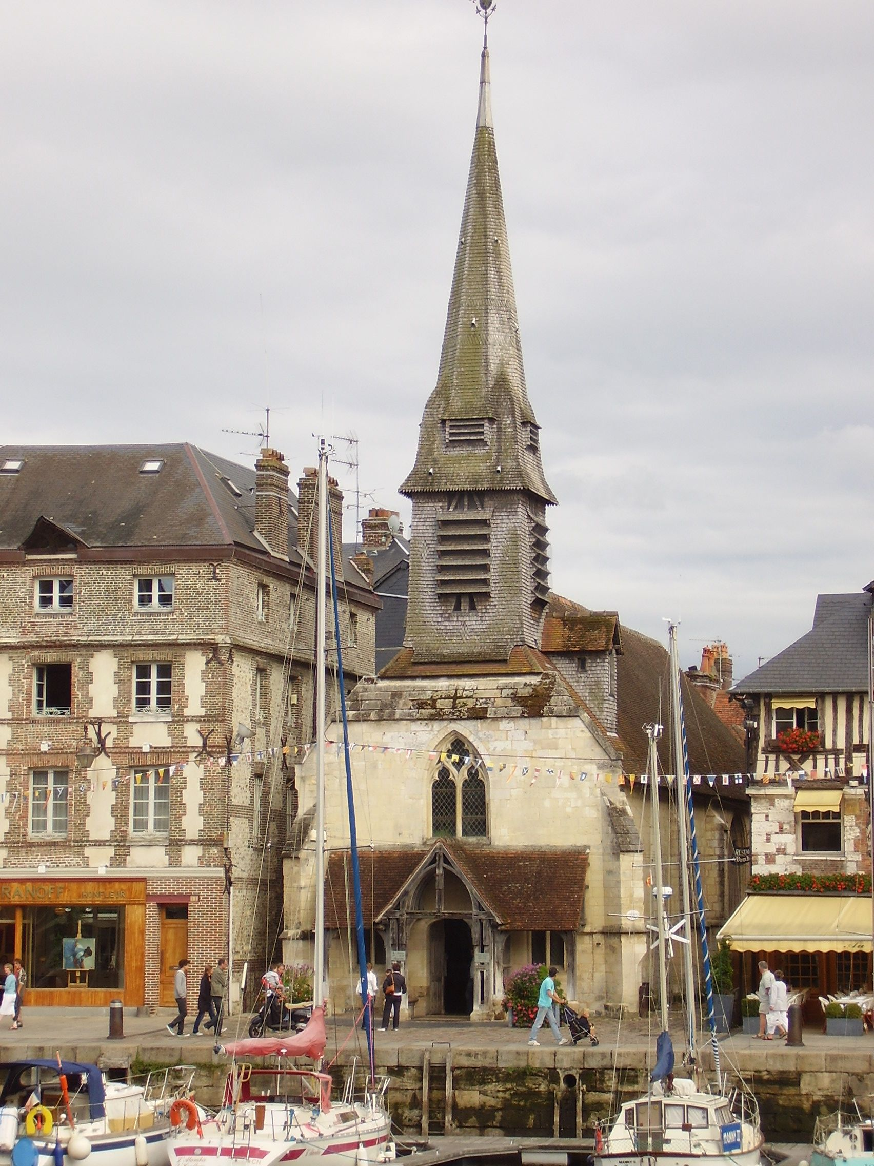 Église Saint-Étienne, Honfleur, France